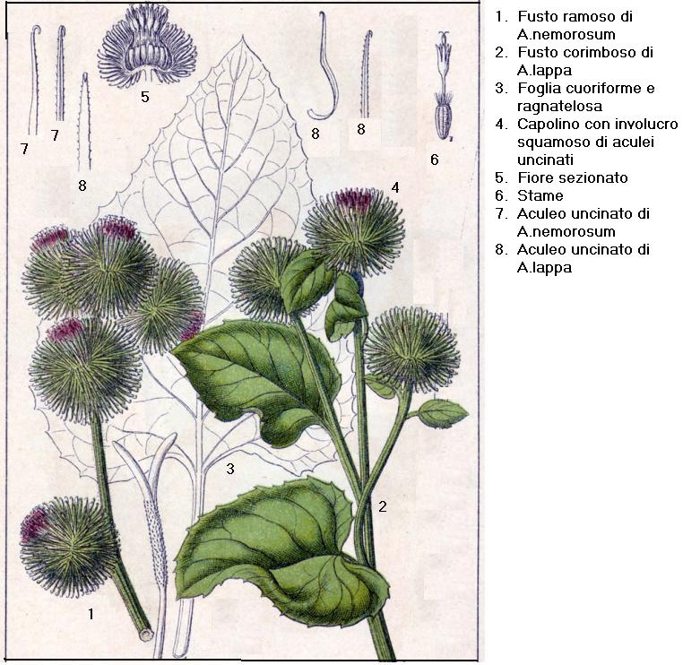 Arctium lappa